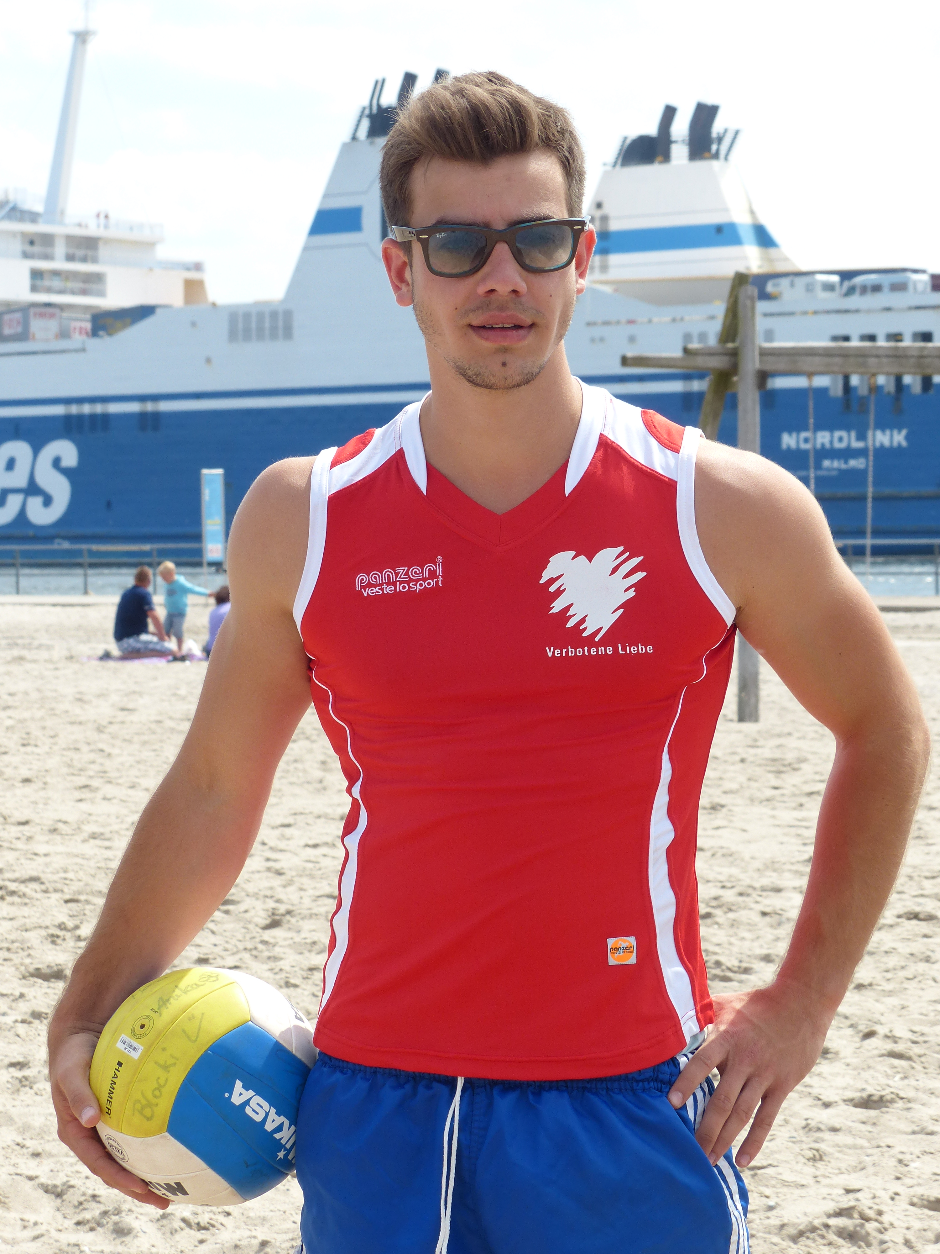 Florian Wünsche beim Fotoshooting, Beachvolleyball-Starcup 2013